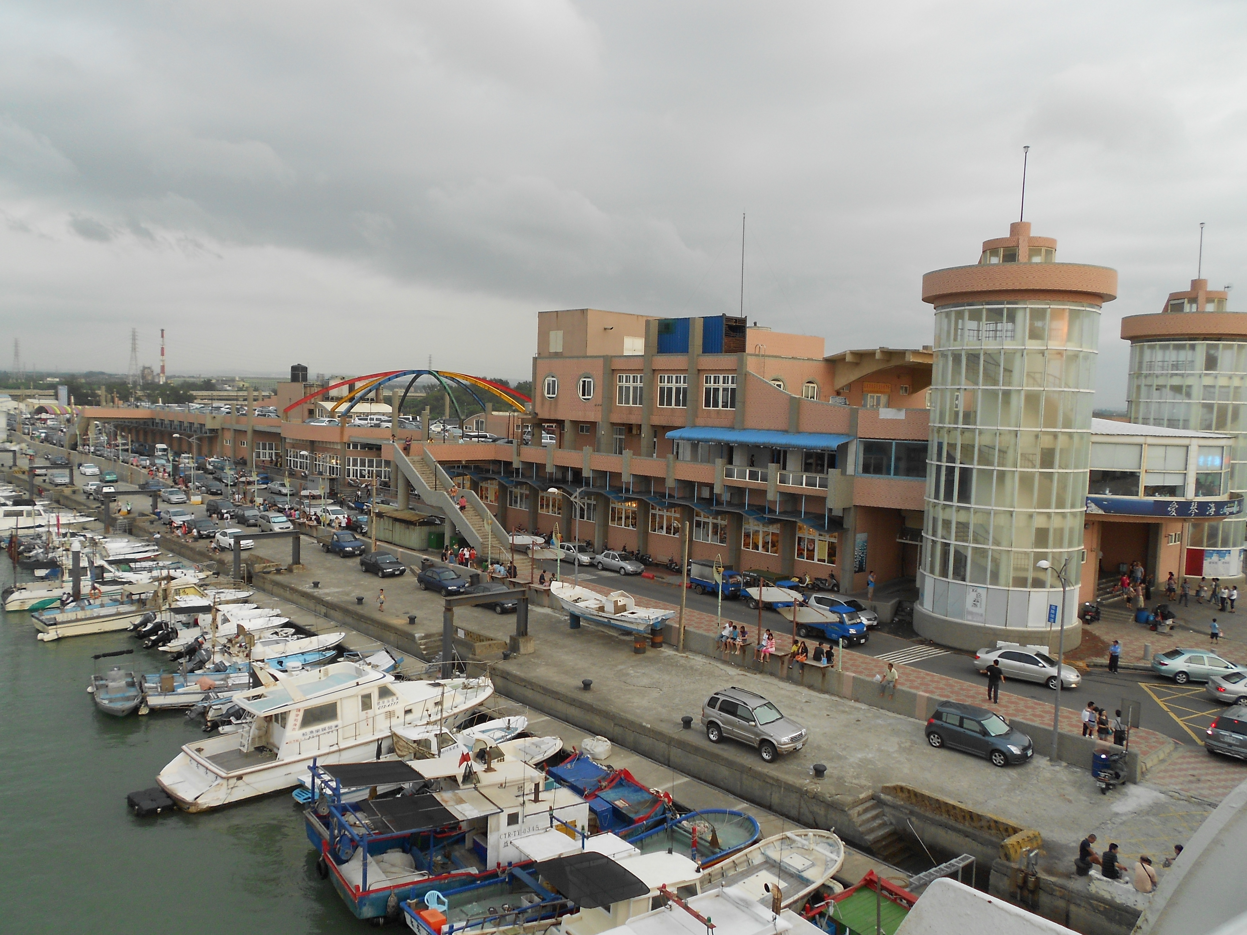 中文（台灣）: 桃園縣新屋鄉永安漁港。